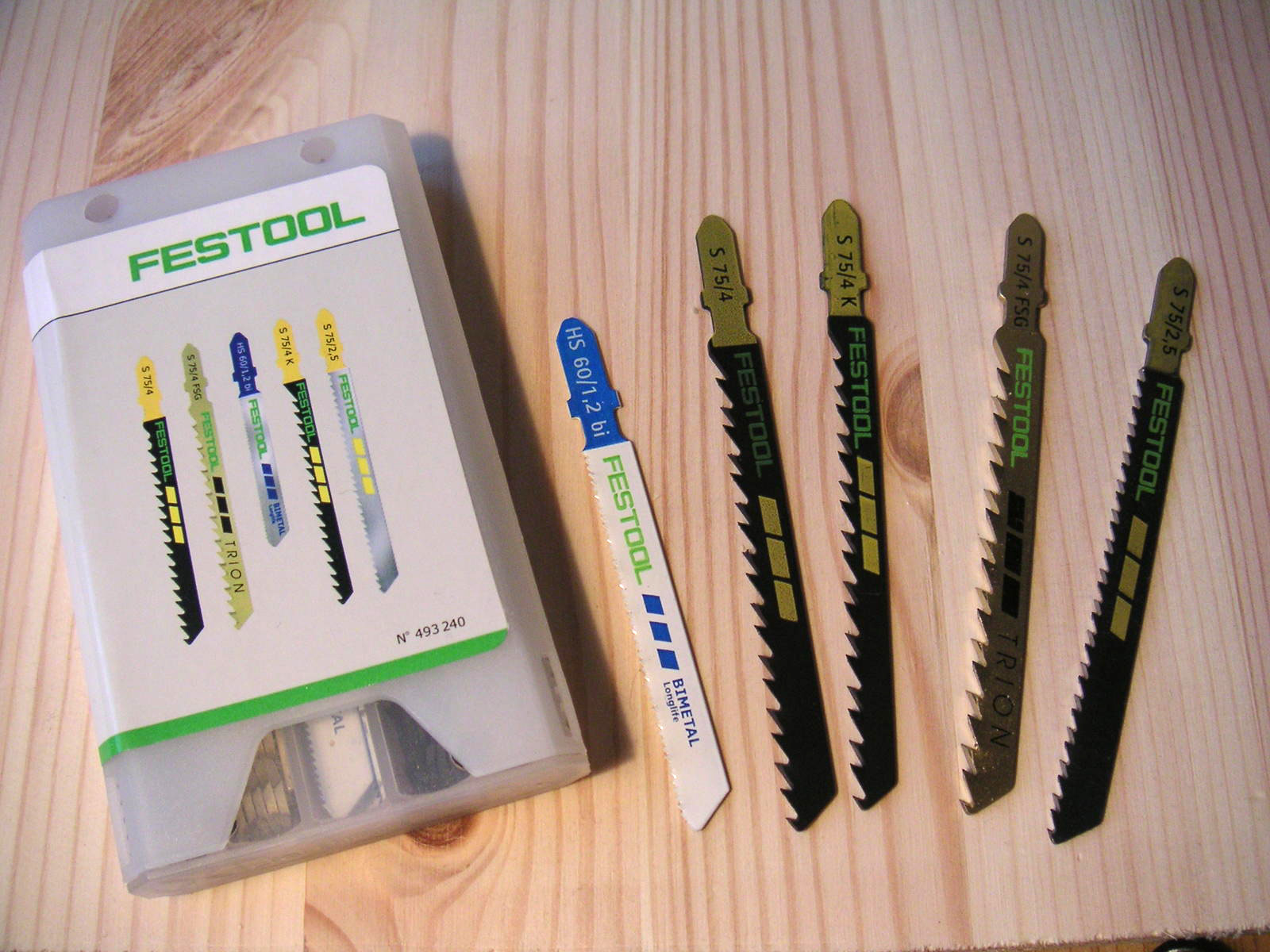 Sägeblätter für eine Stichsäge selbst fotografiert Oxensepp 2008-01-05